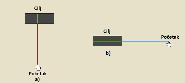 Vreme potrebno za dolazak do mete u Fotsovom zakonu